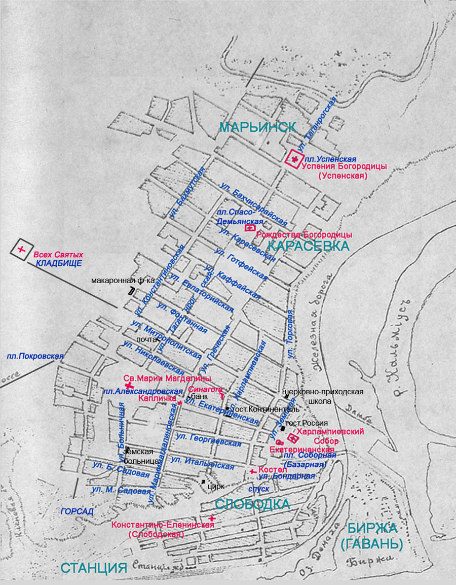 Mariupol old map map